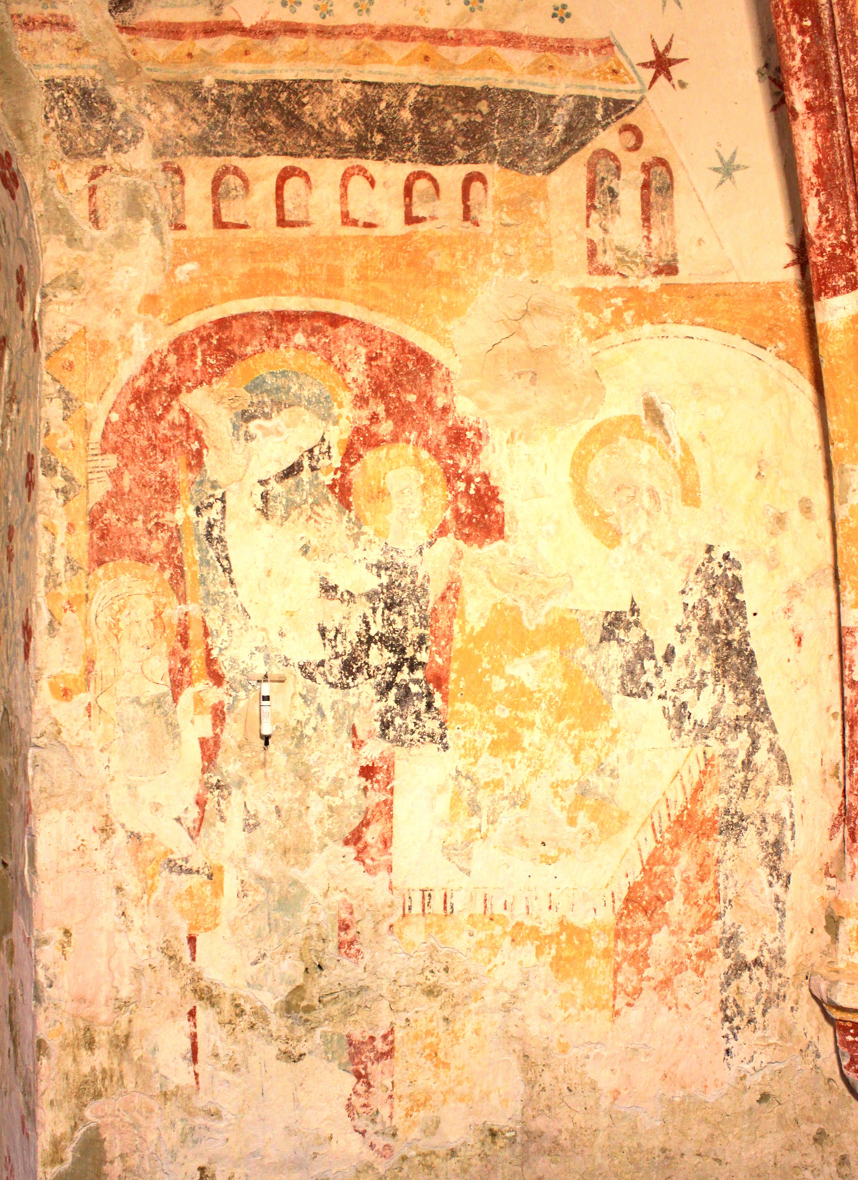 Suisse, canton de Vaud, Daillens, clocher du temple, peintures médiévales du 13e siècle. Elles n’ont subi presque aucune transformation et sont proches de ce qu’elles étaient à l’époque. Paroi orientale, à gauche de la fenêtre axiale, scène biblique.